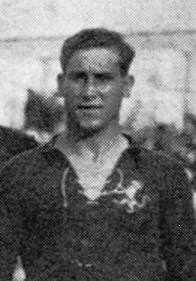 El futbolista y entrenador Agustín Sancho, durante su participación en los Juegos Olímpicos de Amberes 1920 con la selección de España.